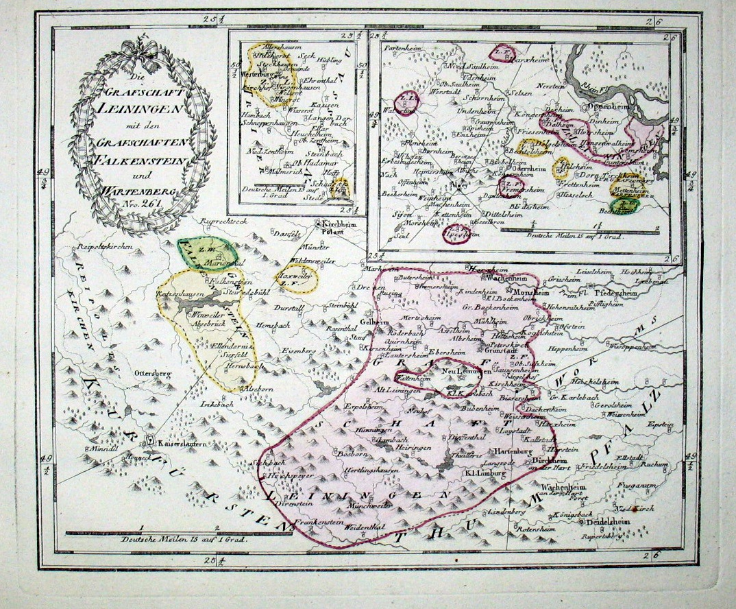 Die Grafschaft Leiningen mit den Grafschaften Falkenstein und Wartenberg. Nro. 261. Kolorierter Kupferstich